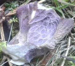 Detall de l'himeni del Gomphus Clavatus